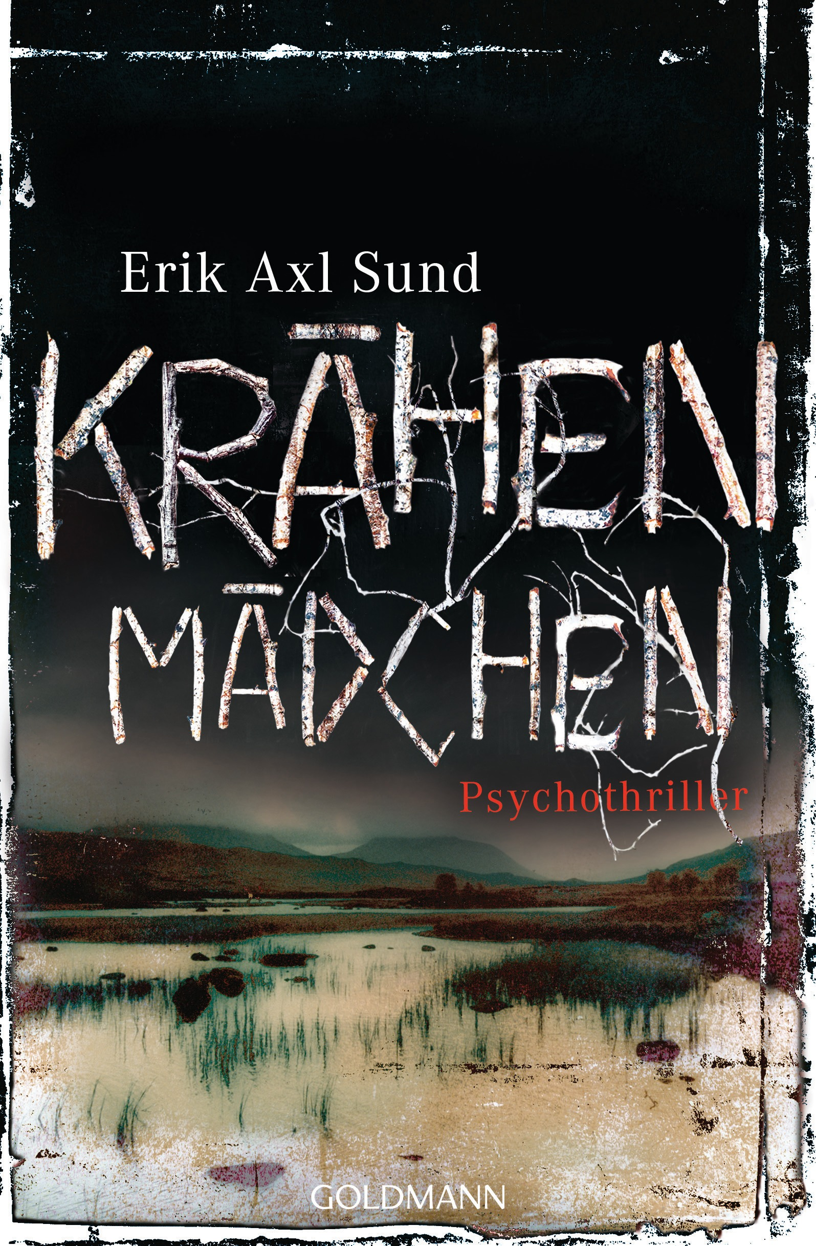 Erik Axl Sund: Krähenmädchen. Goldmann, München 2014. DNB